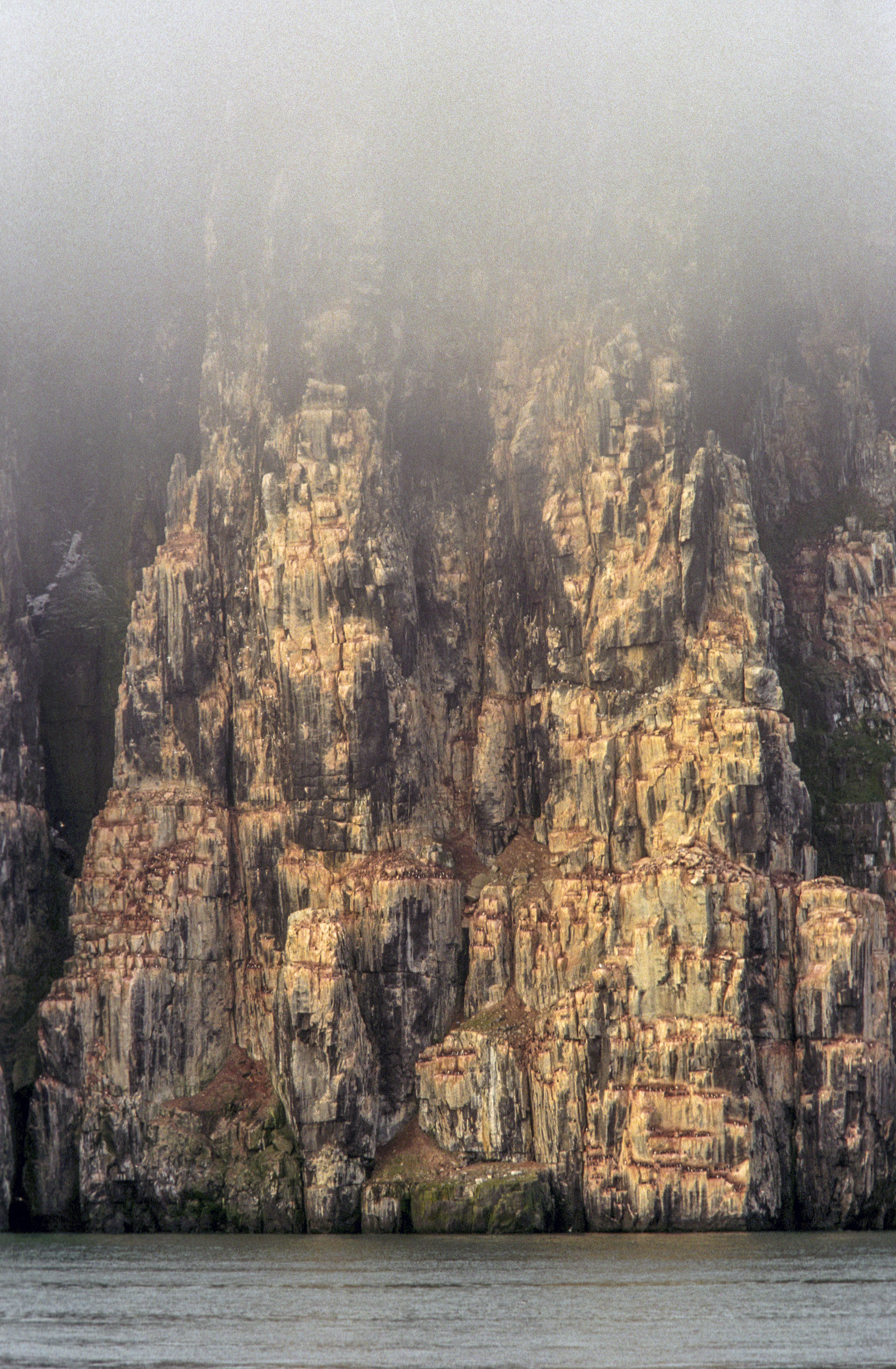 Spitsbergen, Alkefjellet